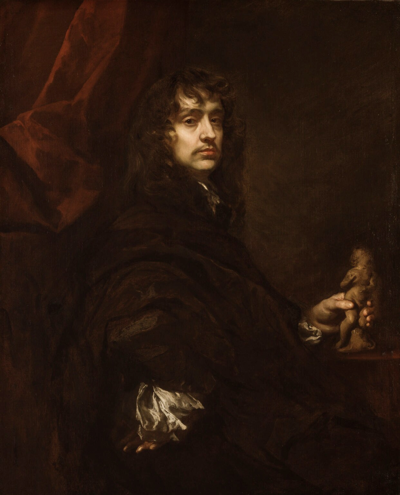 Self-portrait